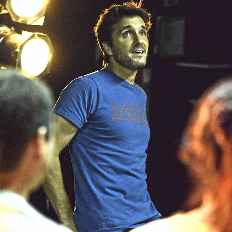 Gerardo Chendo 2019